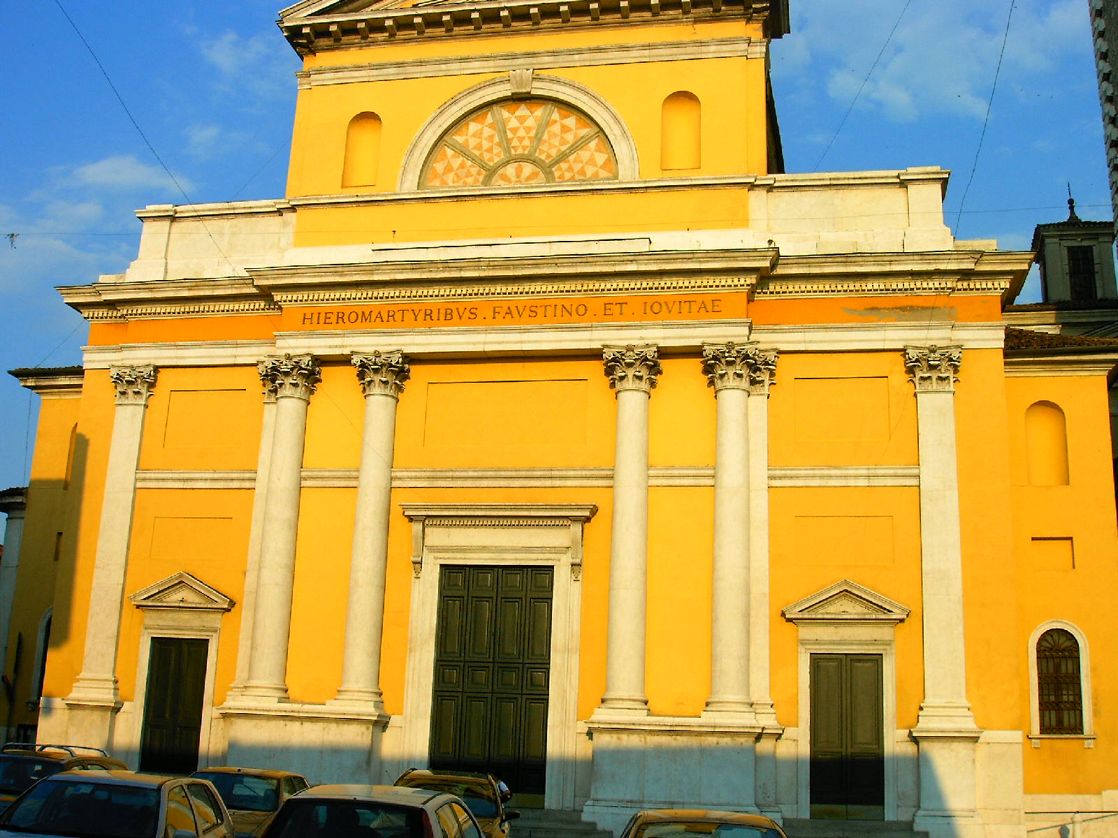 Duomo, Chiari (BS), Italy